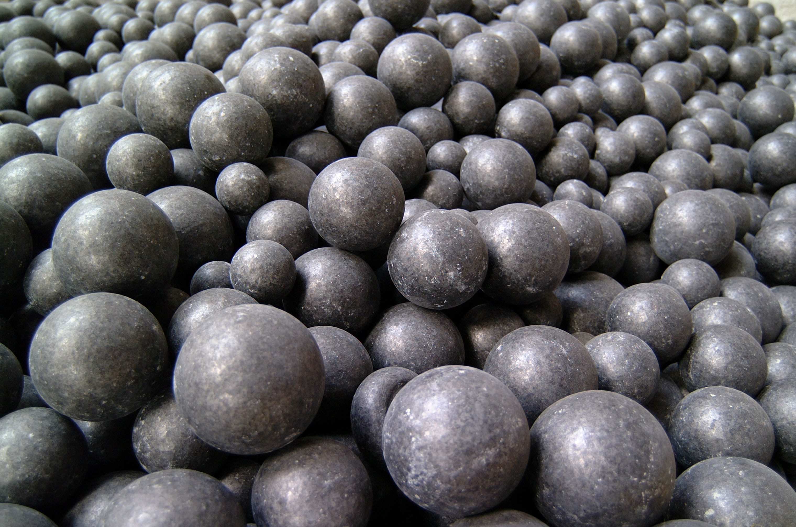 Stålkuler benyttes i sementmøller for å knuse ned klinker til sement.